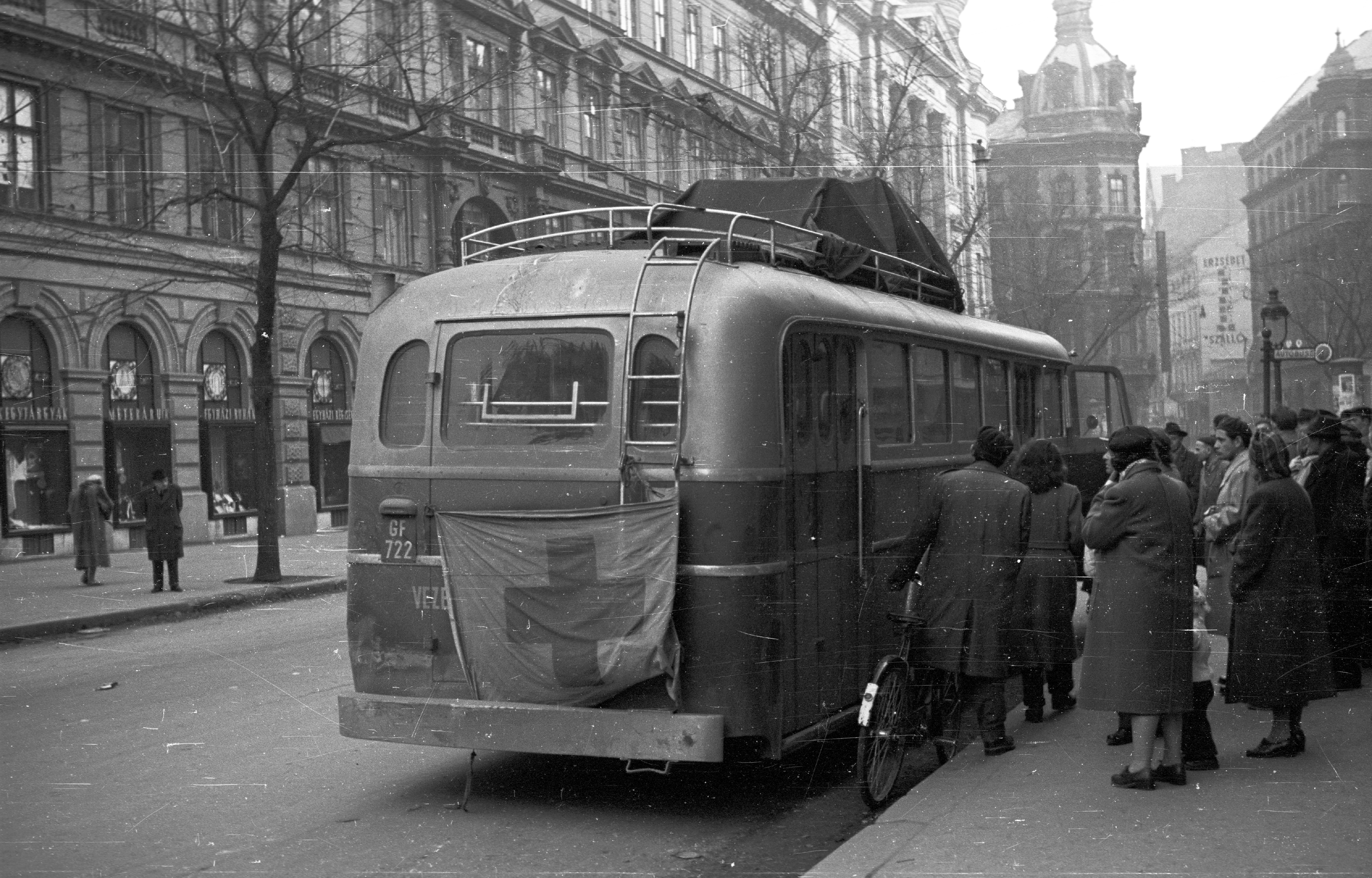 Ferenciek tere a Reáltanoda utca felé nézve. Location: Hungary, Budapest V. Tags: revolution, street view, bus, pedestrian, number plate, Hungarian brand, Ikarus-brand, flag, Budapest Title: Ferenciek tere a Reáltanoda utca felé nézve.